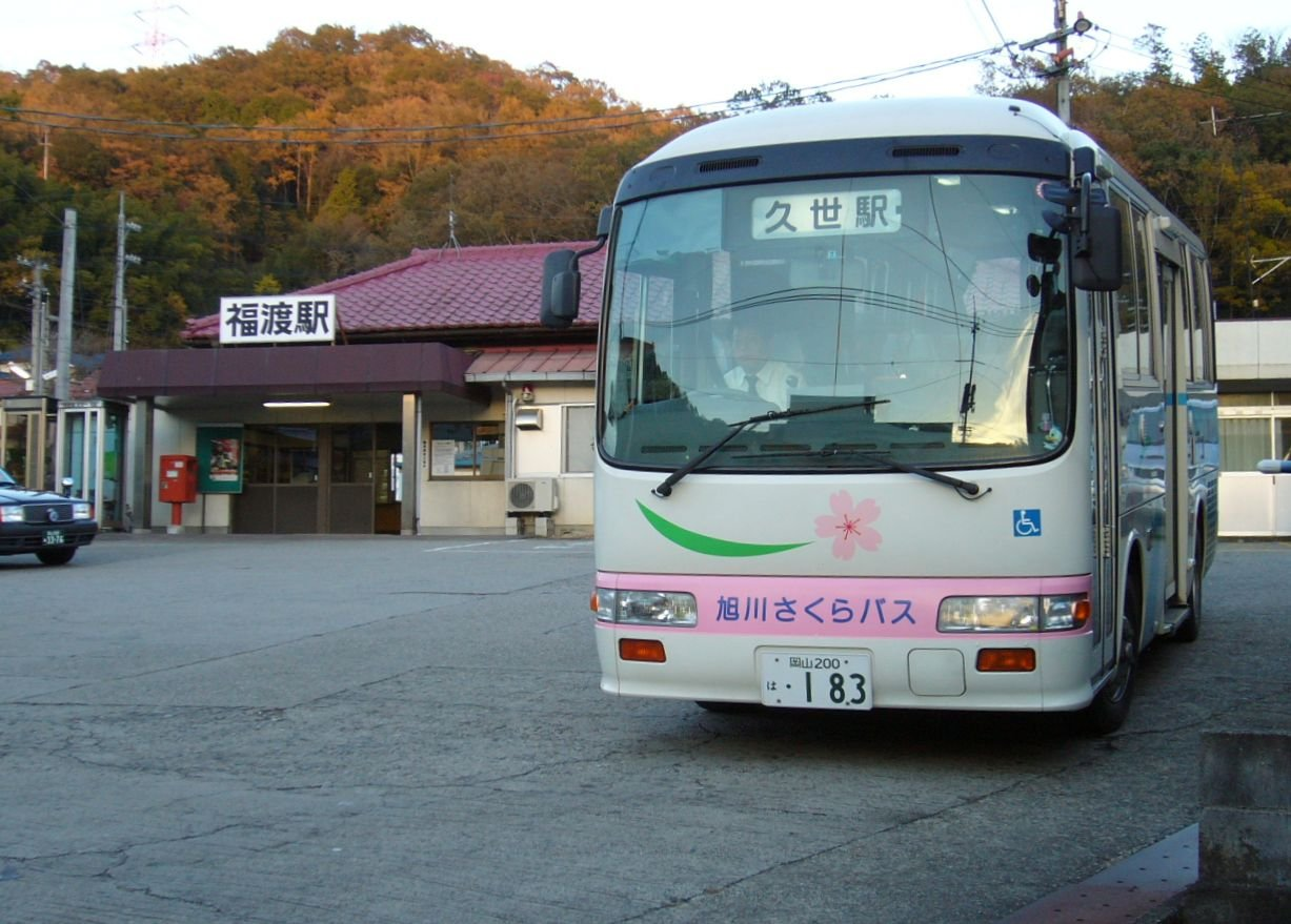 旭川さくらバス 福渡駅前にて